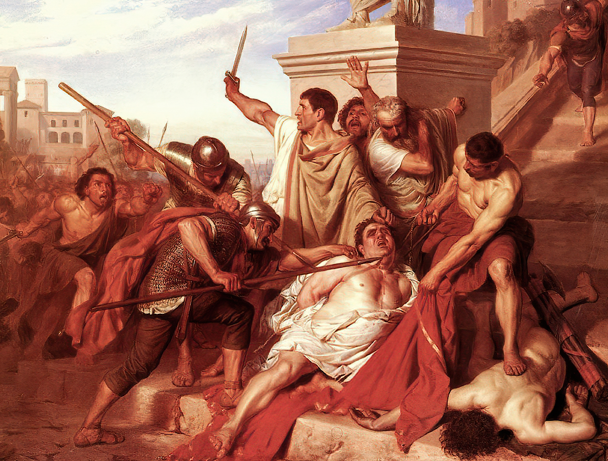 Gustave Housez, La mort de Vitellius, 1847, collection particulière